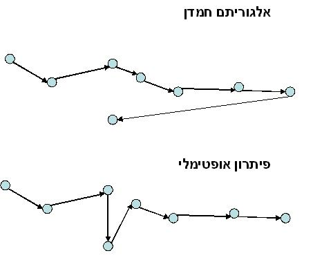 דוגמה לאלגוריתם חמדן